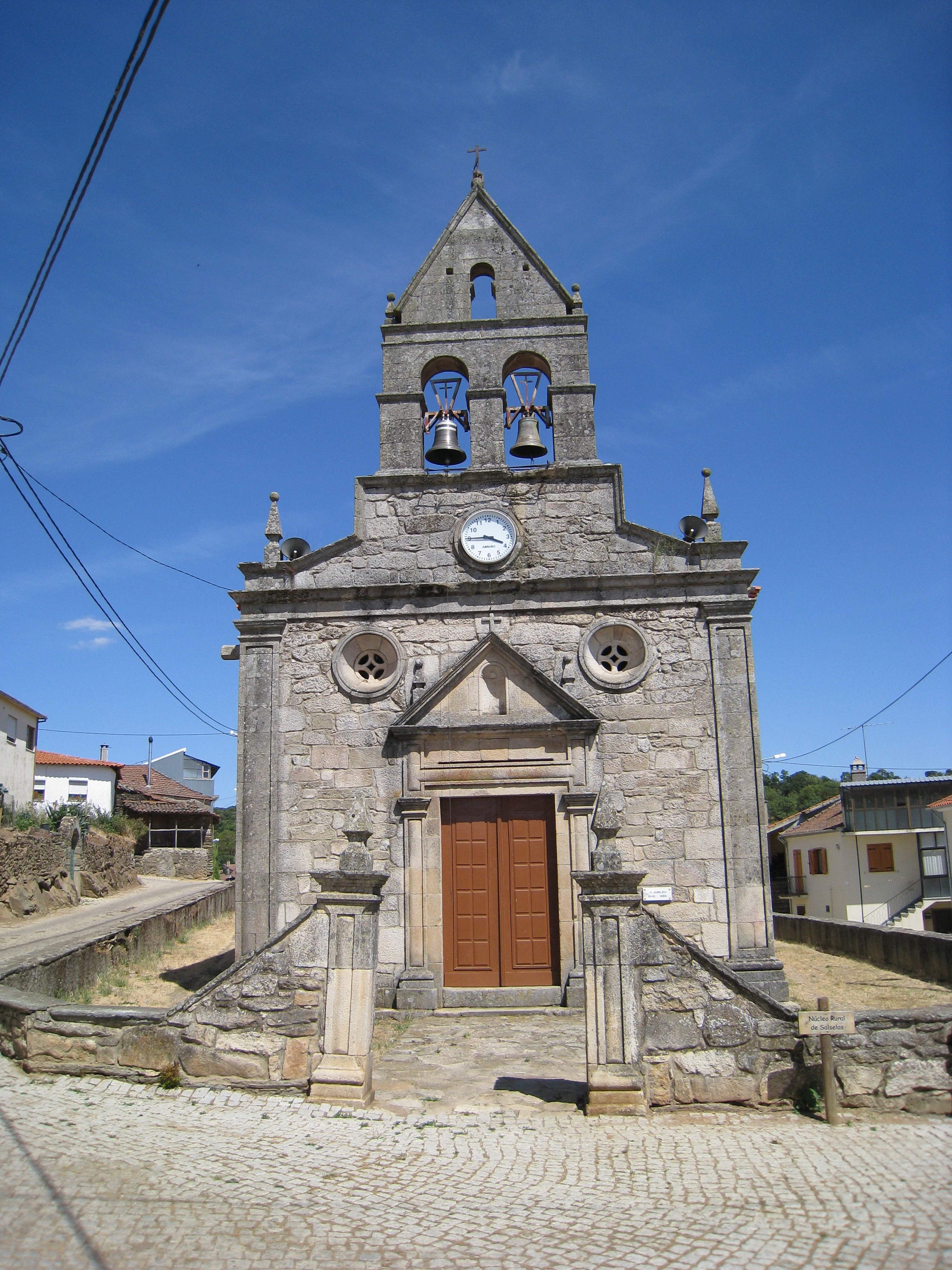 Salselas